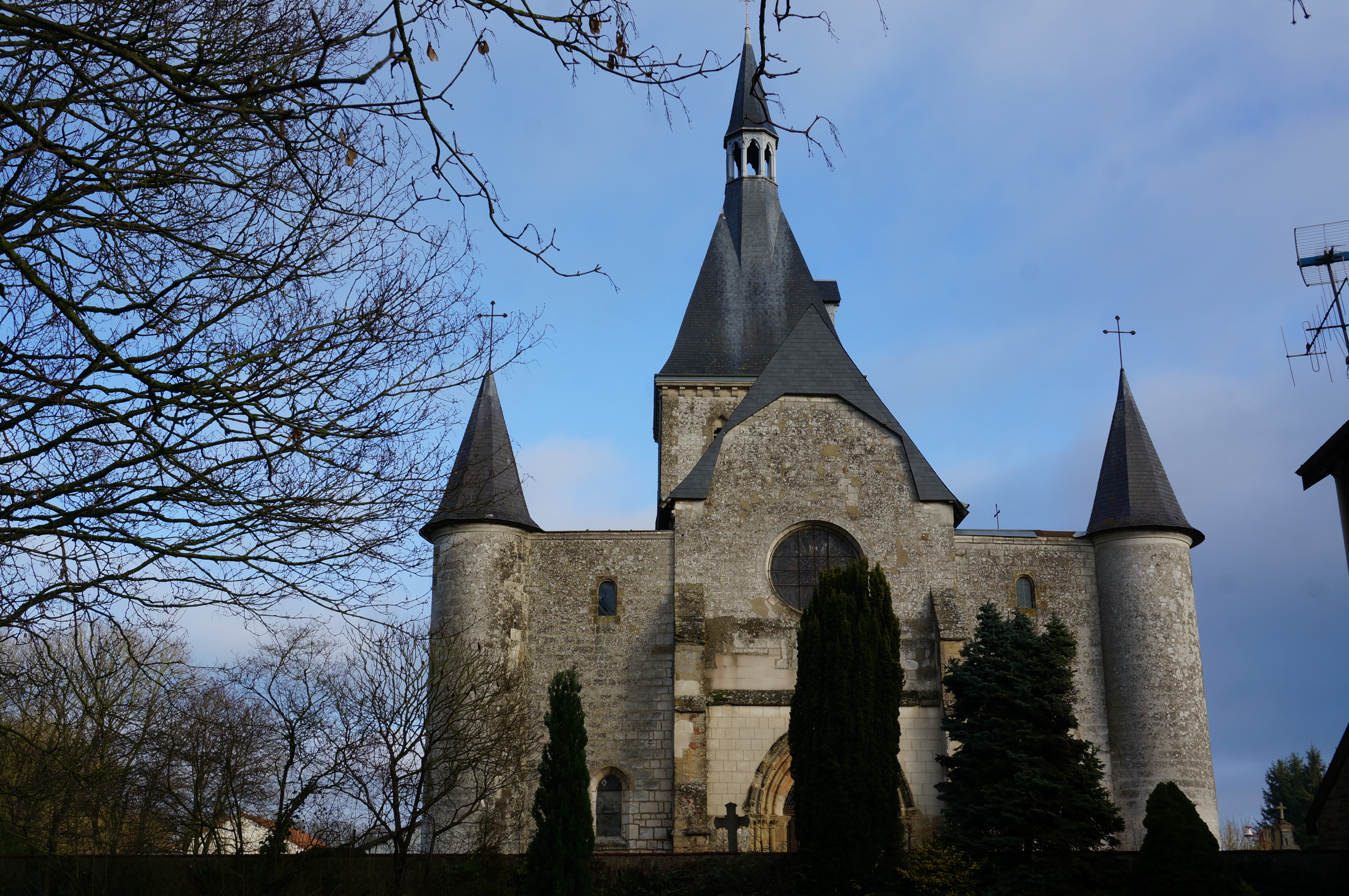 Ripoarisch: à Saint-Remy-sur-Bussy.